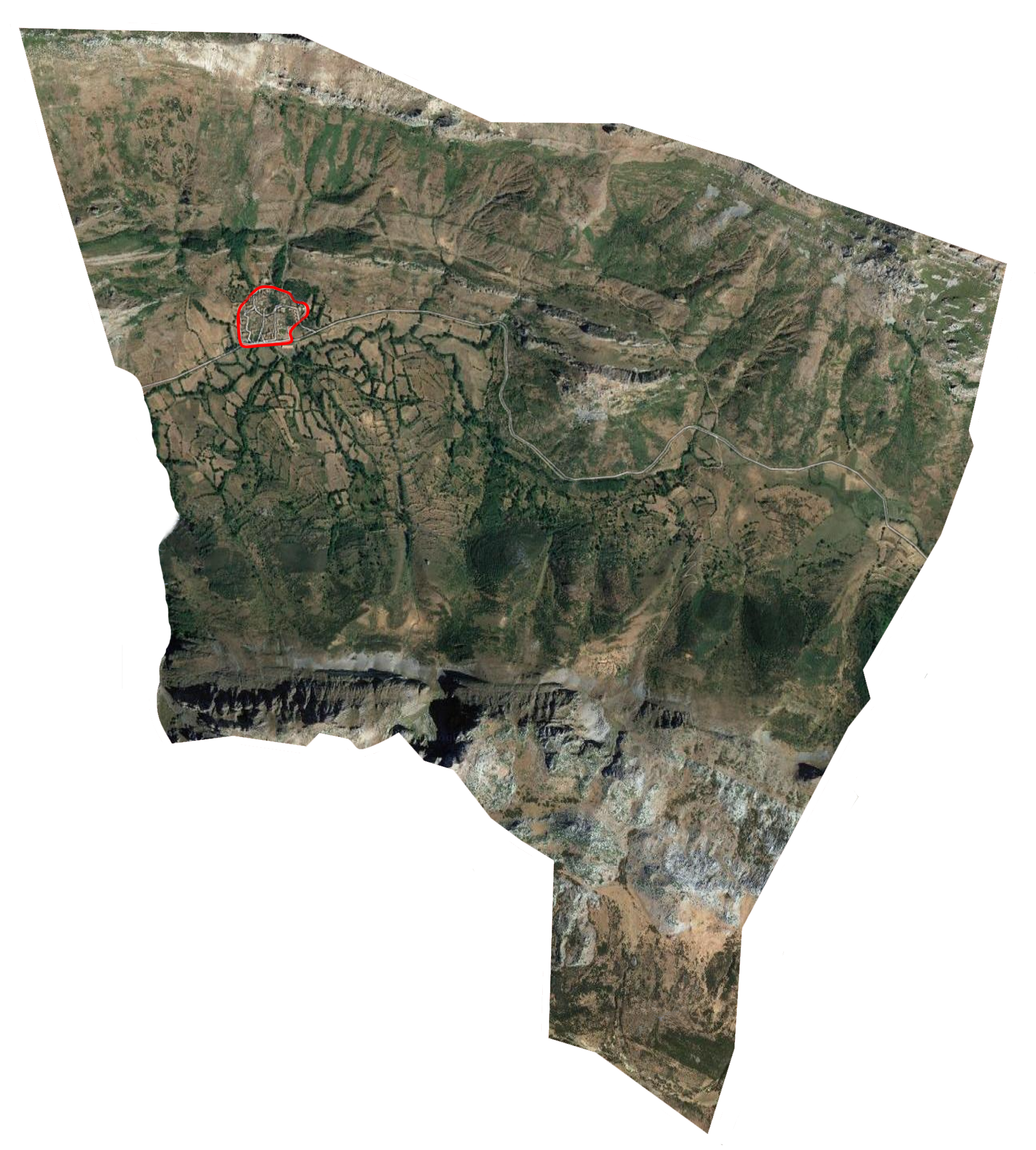 Genicera entera